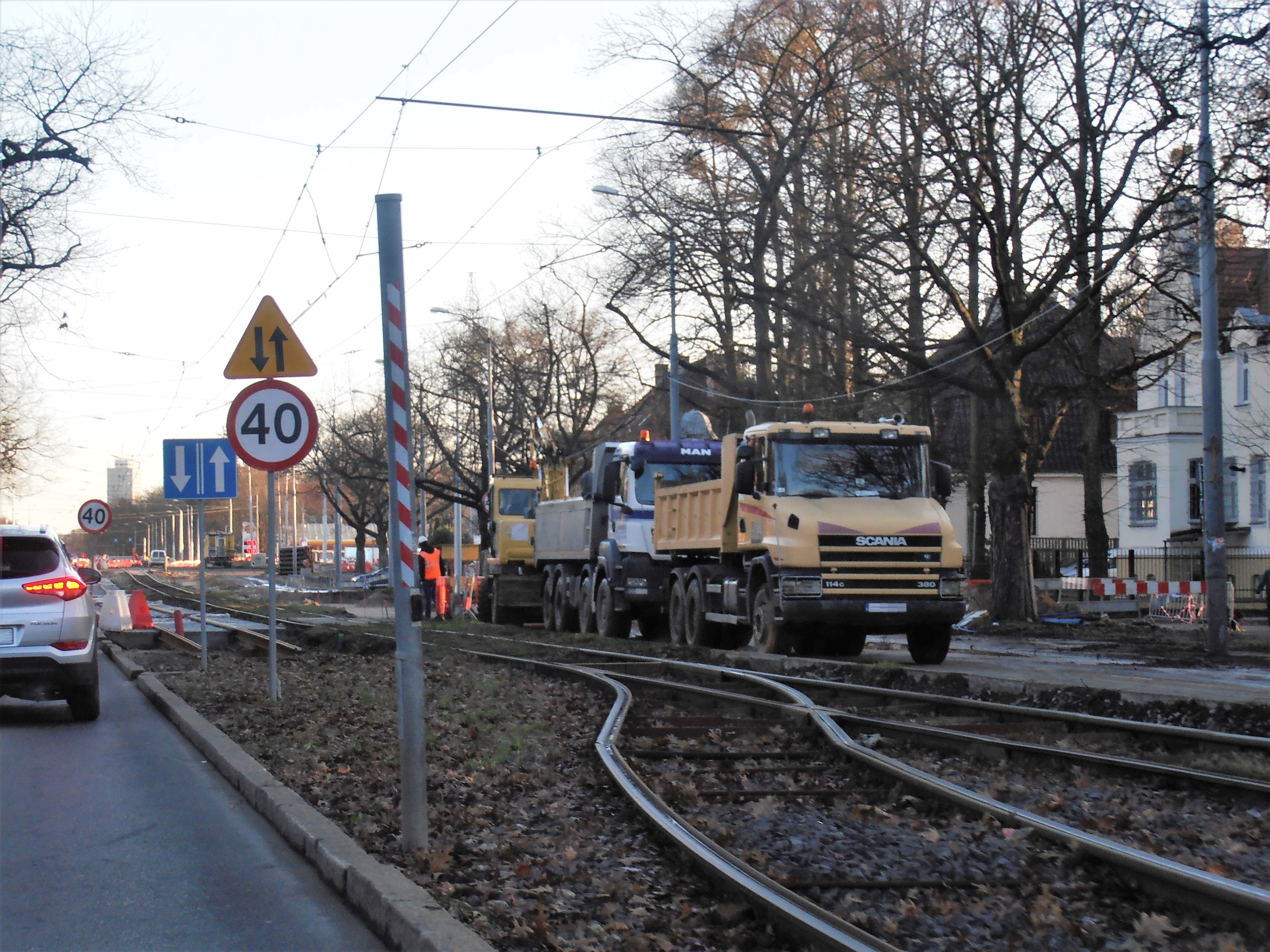 Prace budowlane przy przebudowie torowiska tramwajowego na alei Wojska Polskiego w Szczecinie, 2019